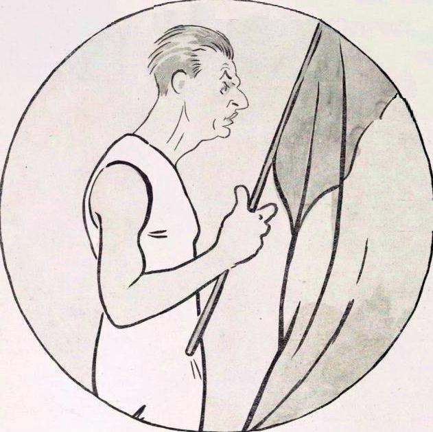 Géo André, porte-drapeau français aux Jeux Interalliés de 1919.